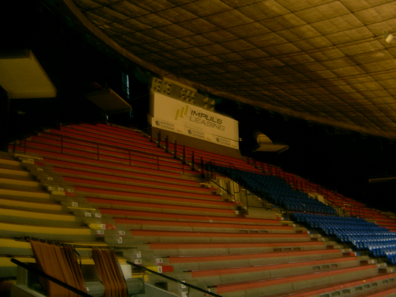 Inter hala Pasienky - tribúna